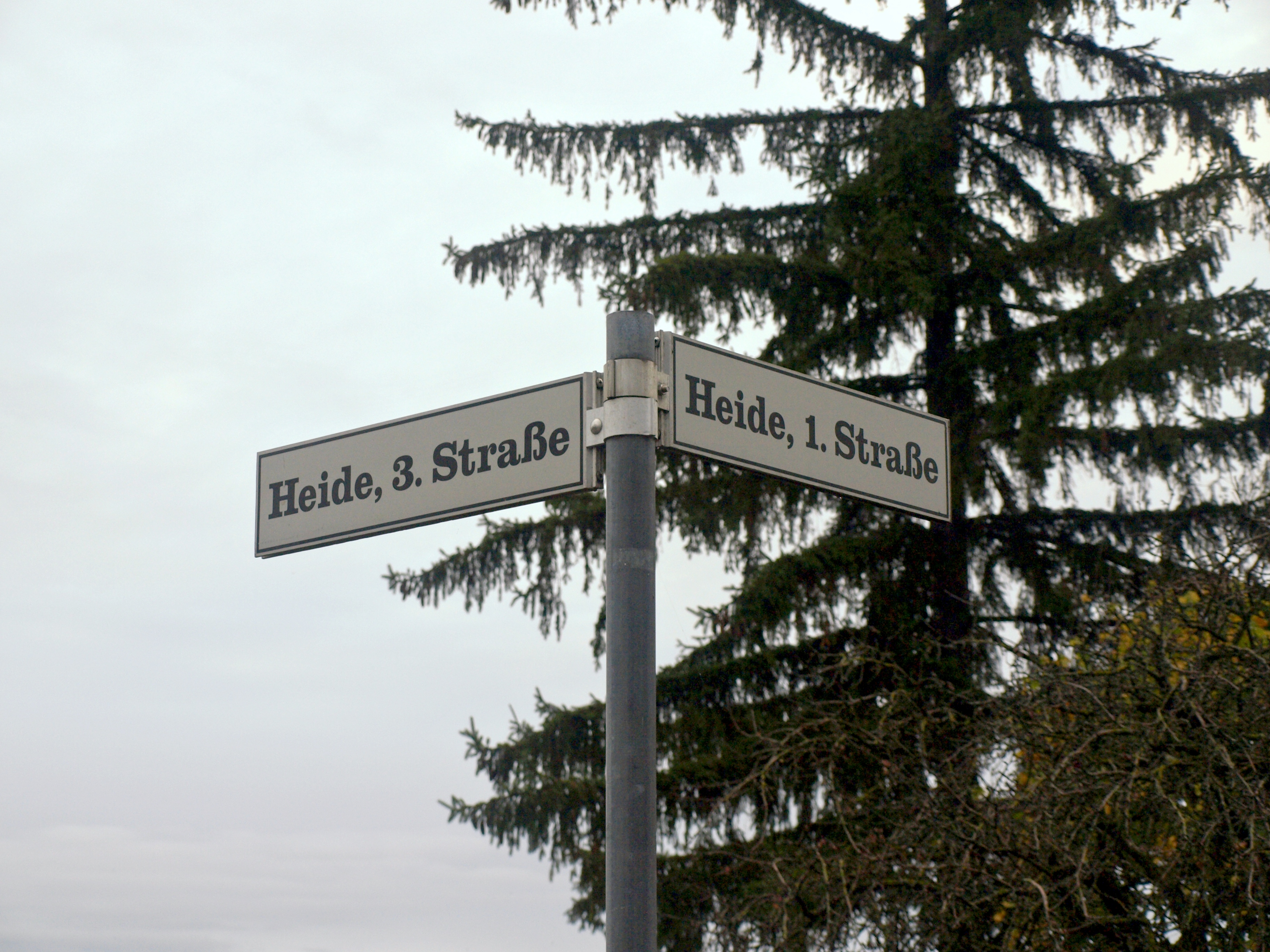 Straßennamen und Beschilderung in Kematen an der Ybbs